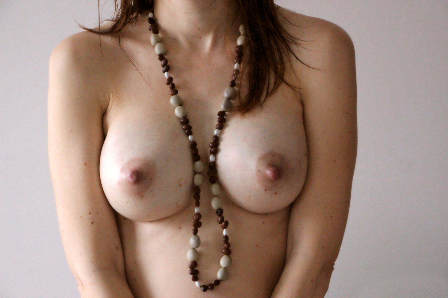 Poitrine de femme au moment de la montée de lait.